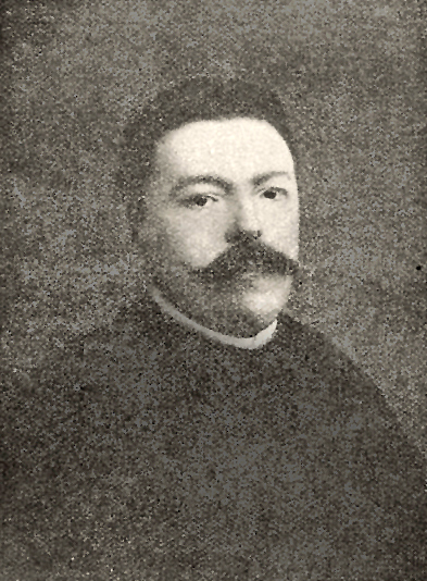 Kunstmaler Adam Siepen, um 1900